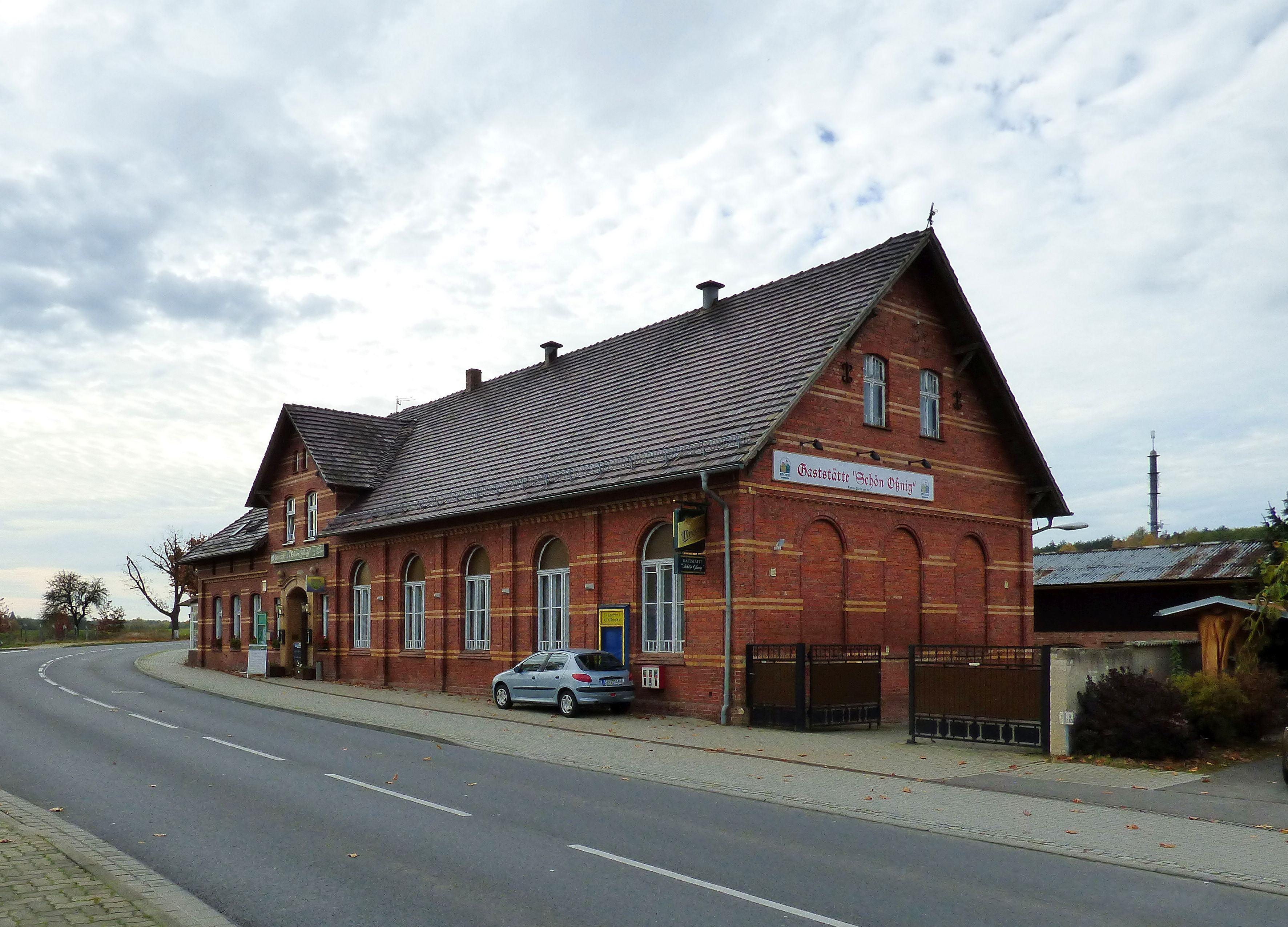 Gaststätte Schön Oßnig in Klein Oßnig